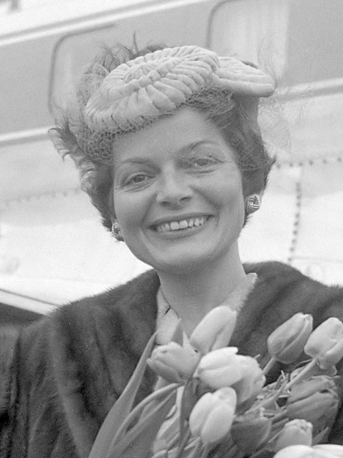 De Zwitserse zangeres Lys Assia op Schiphol 17 maart 1957